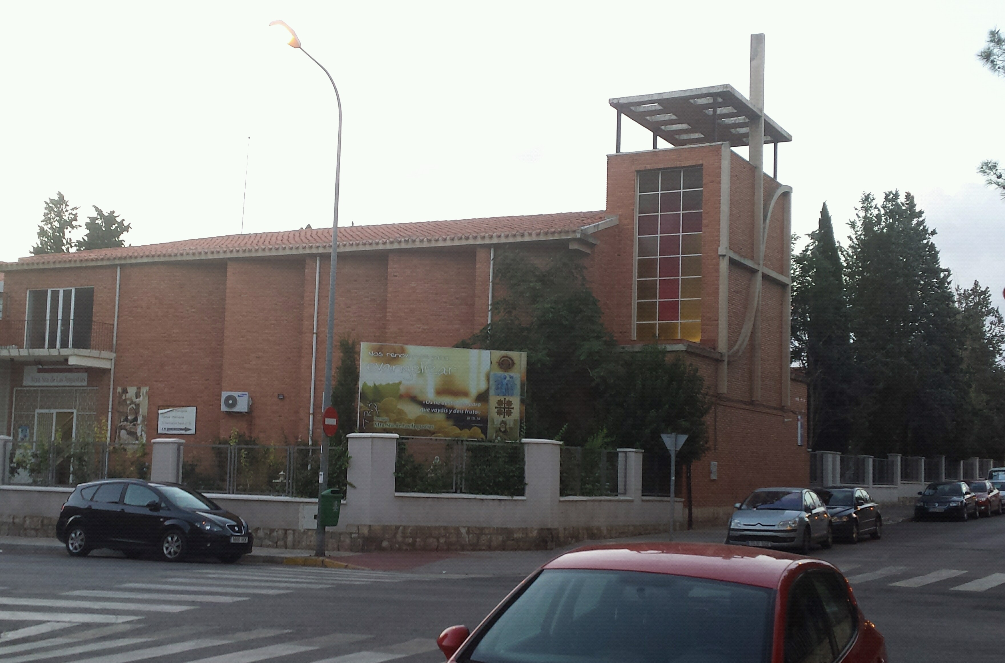 Iglesia Parroquia de Nuestra Señora de las Angustias. Barrio Hospital. Albacete